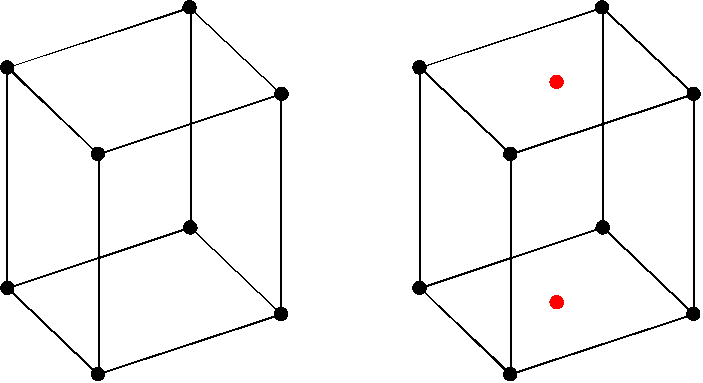 Figure dessinnée par Mahlerite avec OpenOffice 1.5 Licensing Catégorie:Schéma de physique